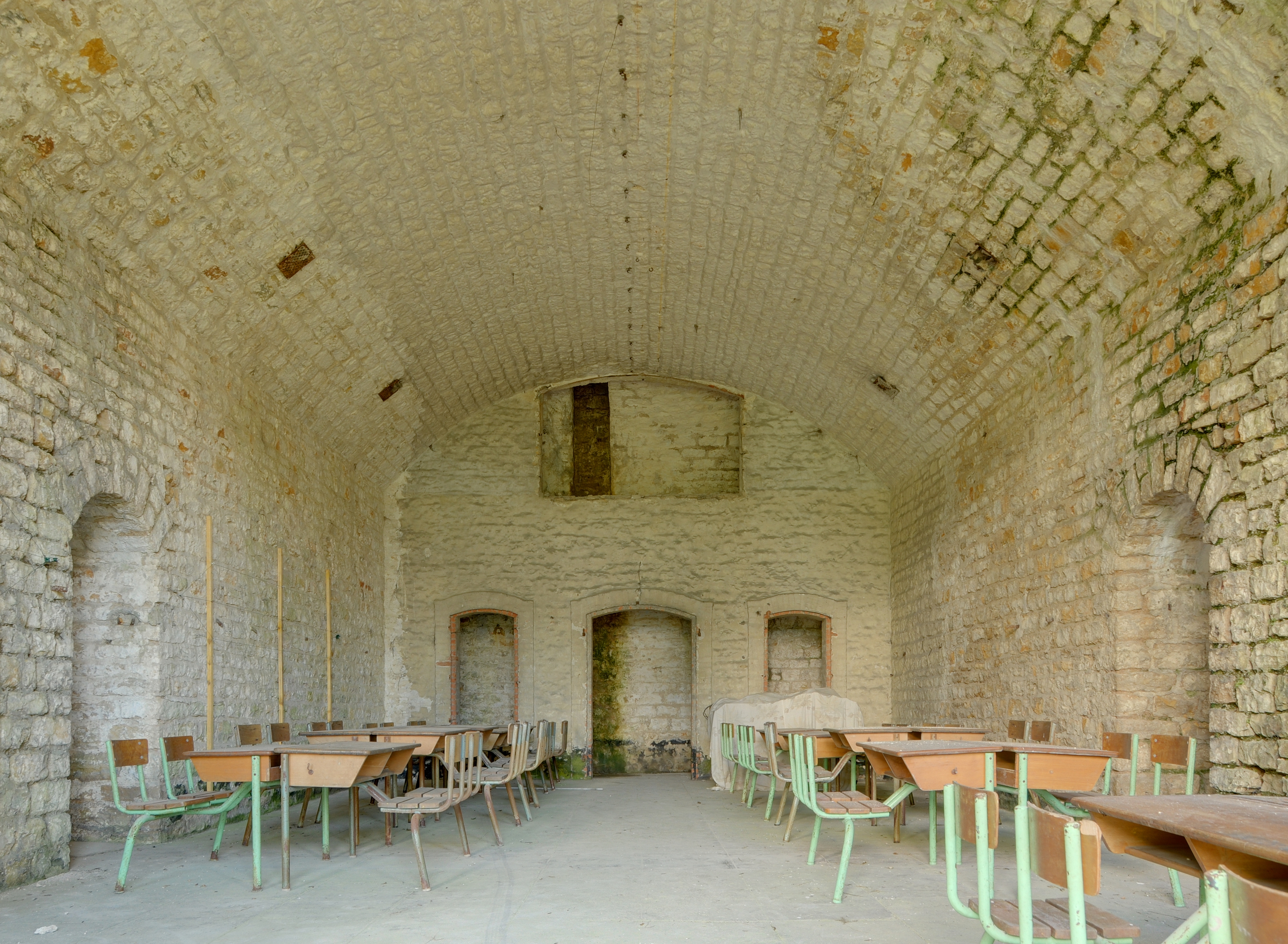 Fort des Basses Perches : dans une des chambrées du casernement principal. Basses perches fortifications.